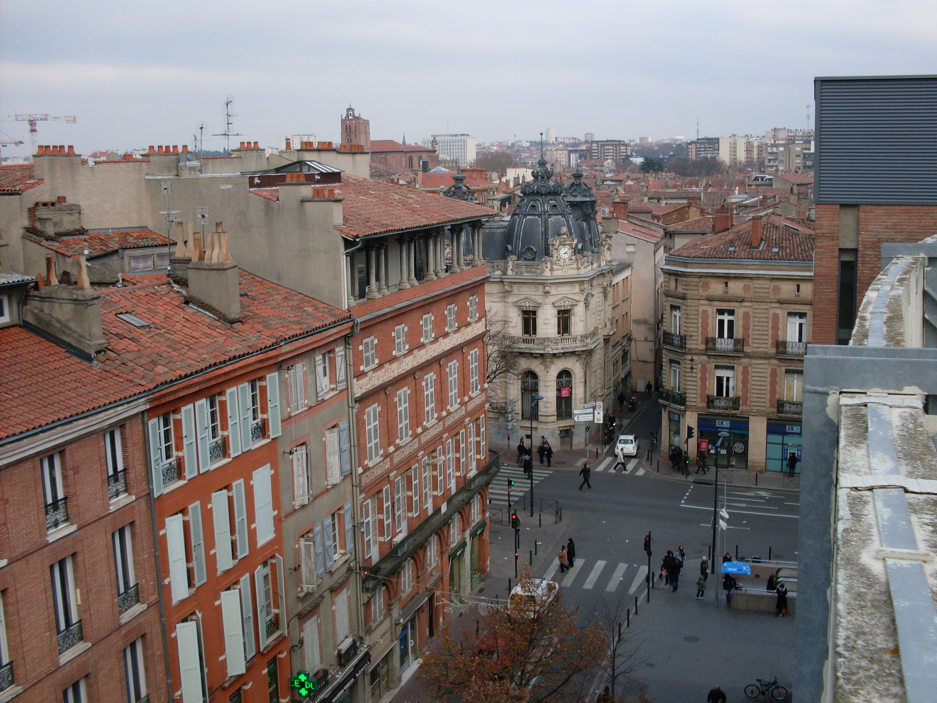 Place des Carmes, Toulouse, carrefour Place des Carmes - Rue du Languedoc - Rue du Canard